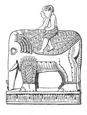 Darstellung des Elefanten bzw. Läufers / Echecs de Charlemagne